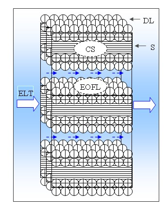 Molecular power 33. Scheme of formation of electroosmotic flux and double electric layer in regular capillary structure.